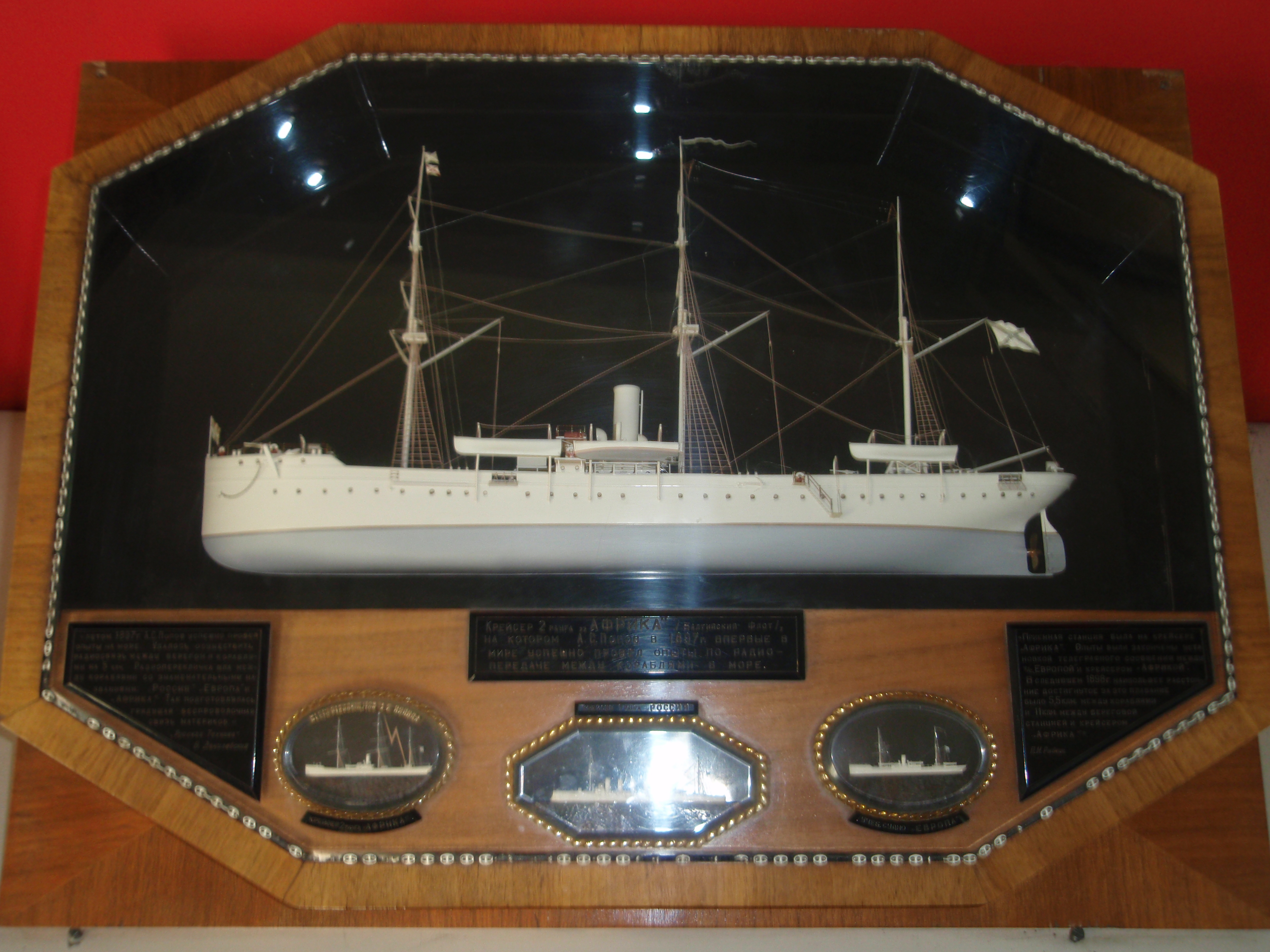 Памятная модель крейсера 2-го ранга «Африка», Государственный Политехнический музей (г.Москва)